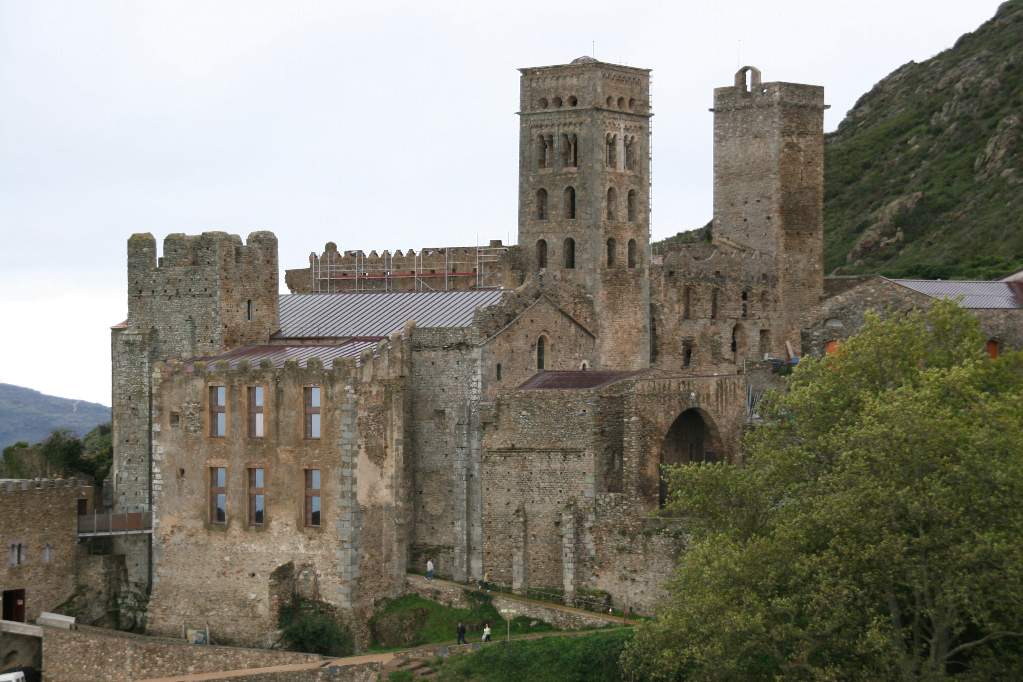 Monasterio de Sant Pere de Rodes en Girona (España). Cámara: canon EOS 20D.